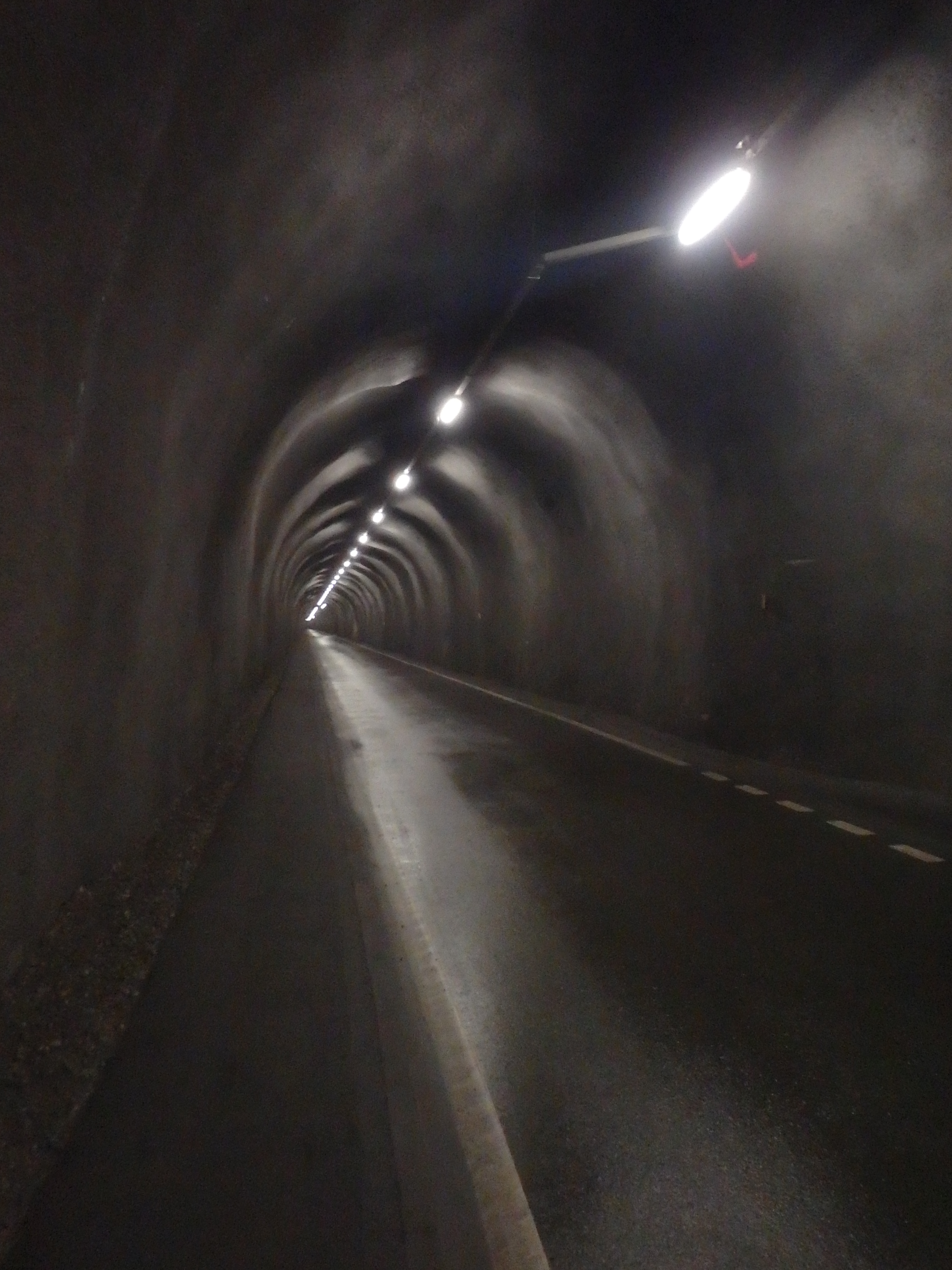 Blick von Tunnelkilometer 0,680 Richtung Nordportal (km 0). Der Tunnel hat eine Fahrbahnbreite von 4,00 Meter und ist mit Spritzbeton ausgekleidet.